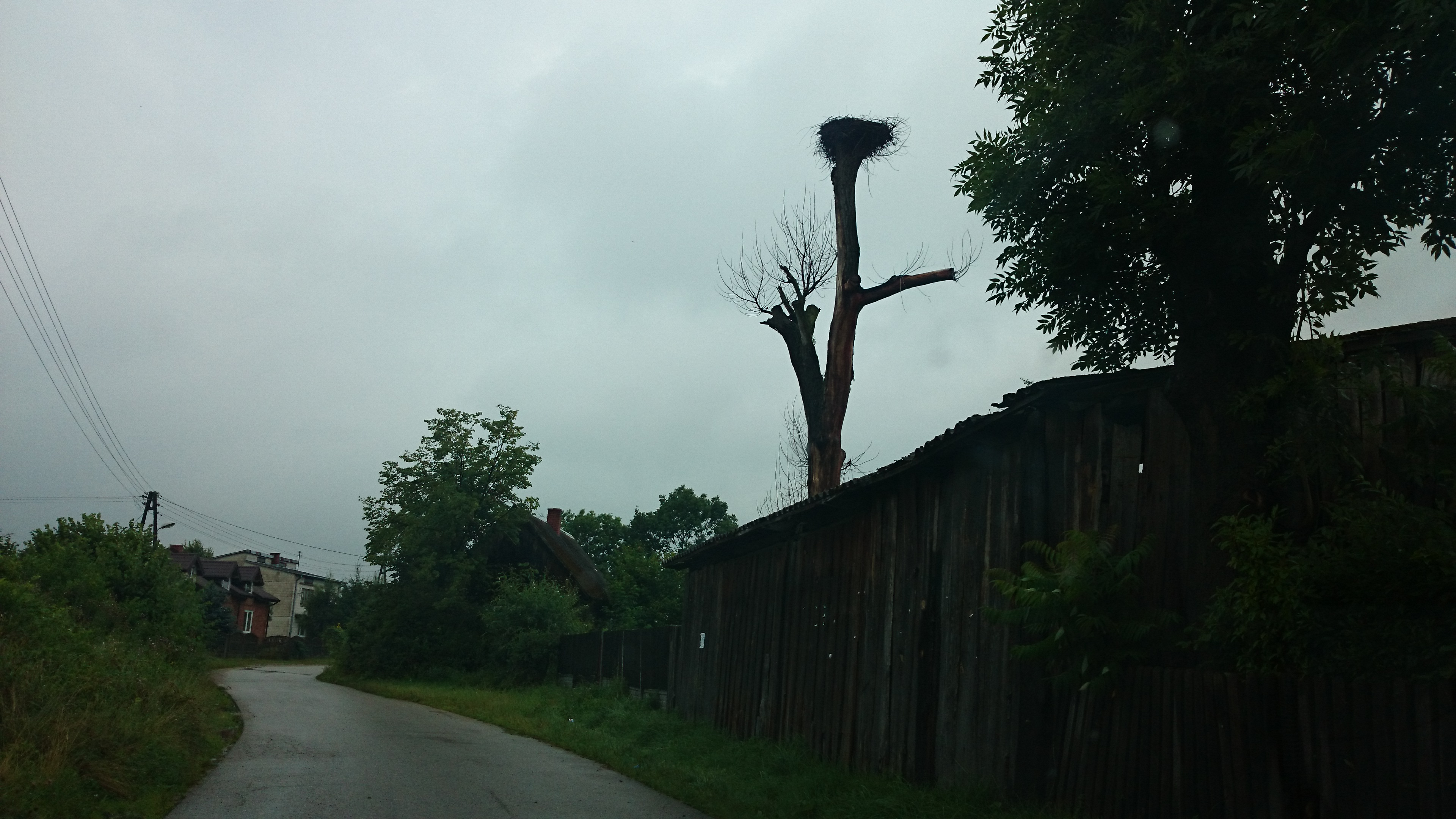 Przystałowice Duże-Kolonia - bocianie gniazdo